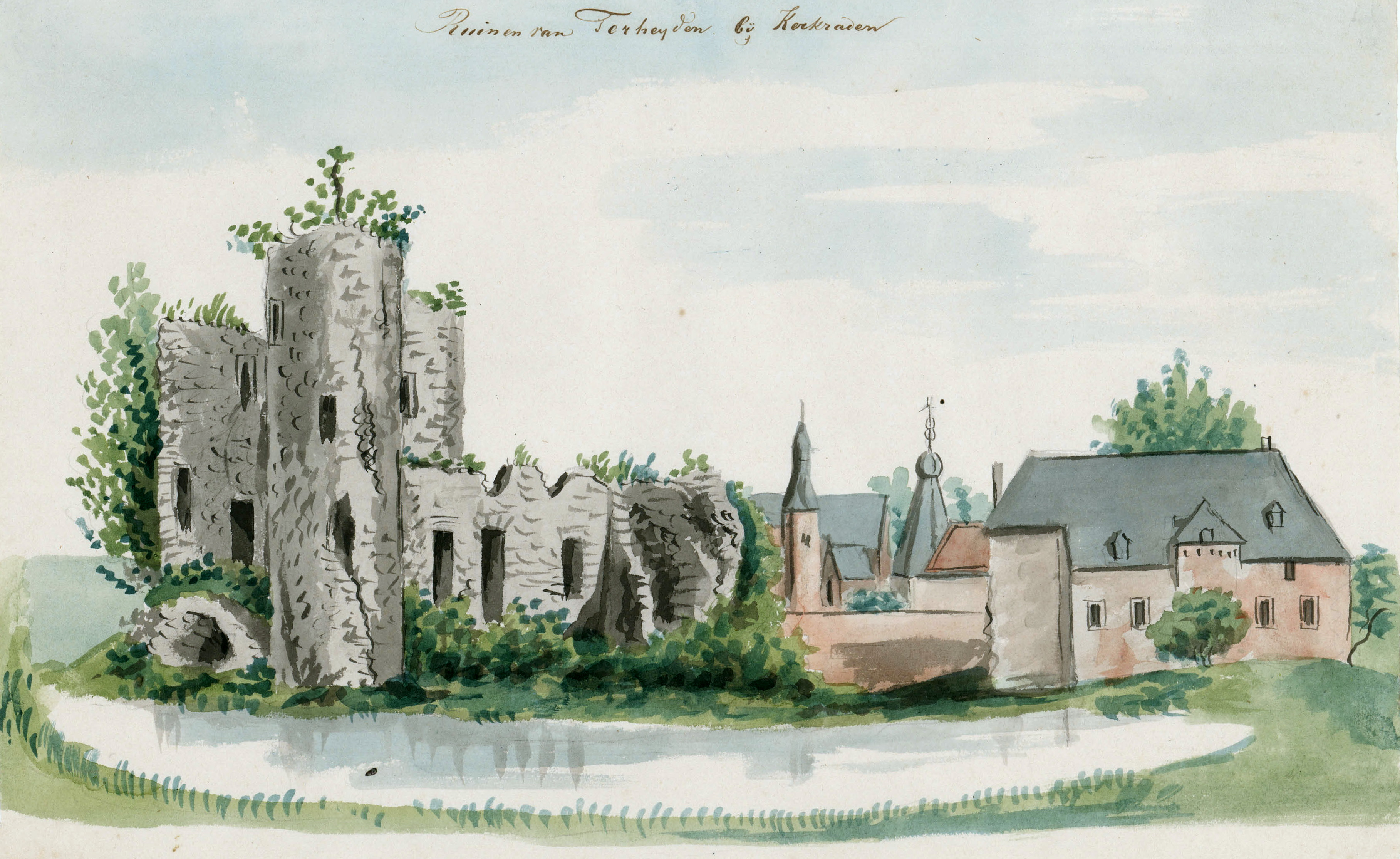 Ingekleurde tekening van Philippe van Gulpen van de ruïne van Haus Heyden in Horbach nabij Aken/Kerkrade. Bijschrift: Ruinen van Terheyden bij Kerkade. Collectie Van der Noordaa in het RHCL, Maastricht, CVDN 317.